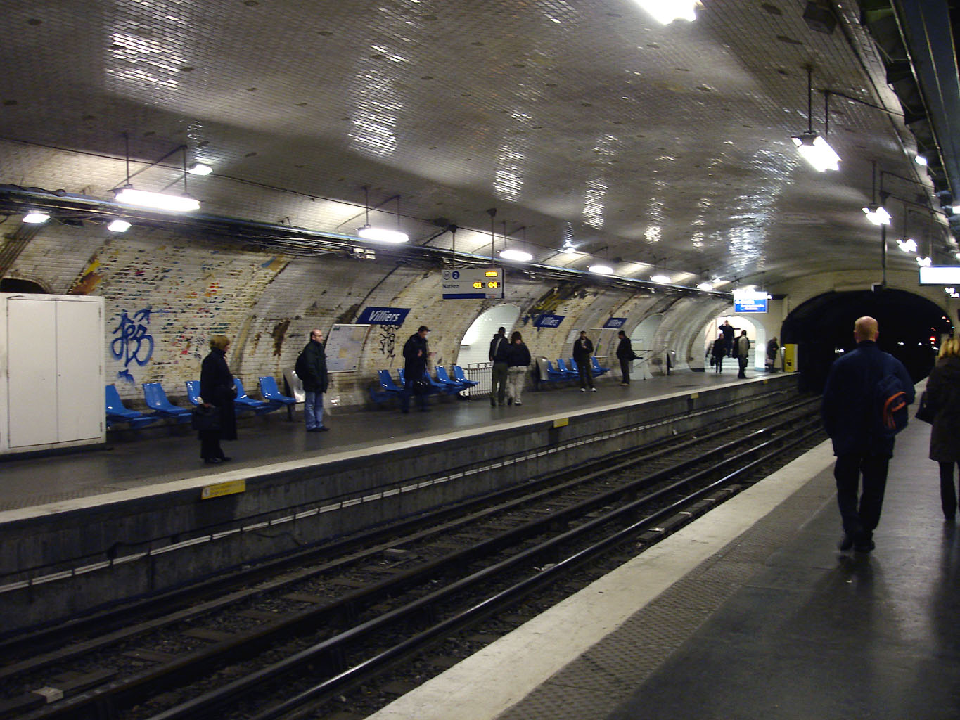 Station Villiers, de la ligne 2 du métro de Paris, France.